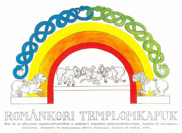 Románkori templomkapuk füzet borítóján Aleppó és Kvidinge kapujának részlete